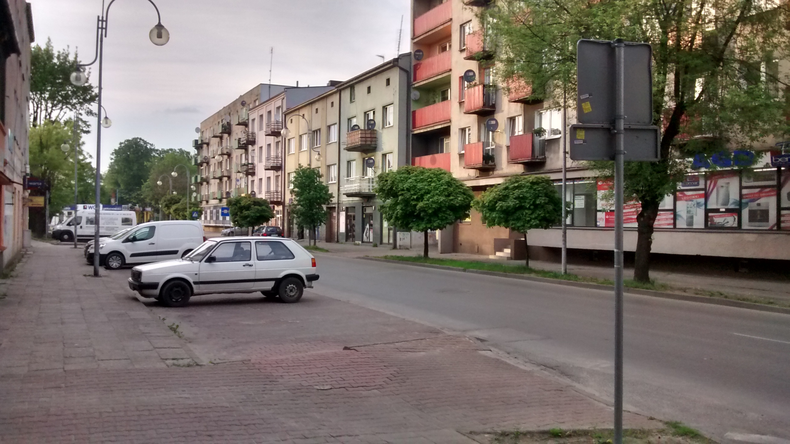 Ulica Władysława Reymonta